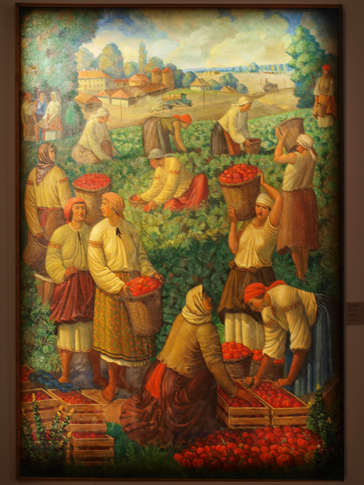 «Збирання помідорів». Полотно, олія. 1932 Національний художній музей України